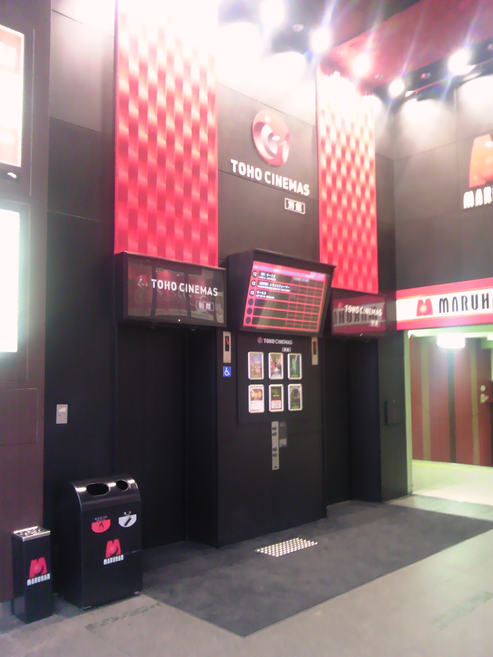 TOHOシネマズなんば・別館